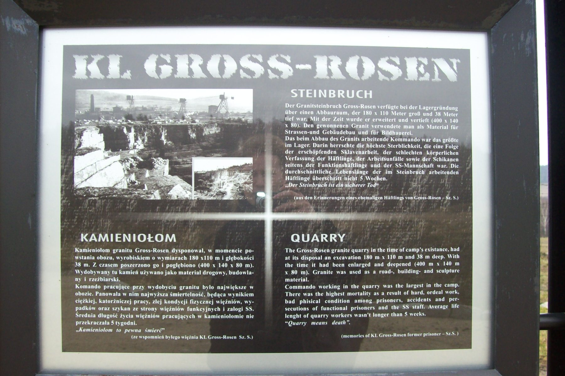 Tablica informacyjna Gross-Rosen